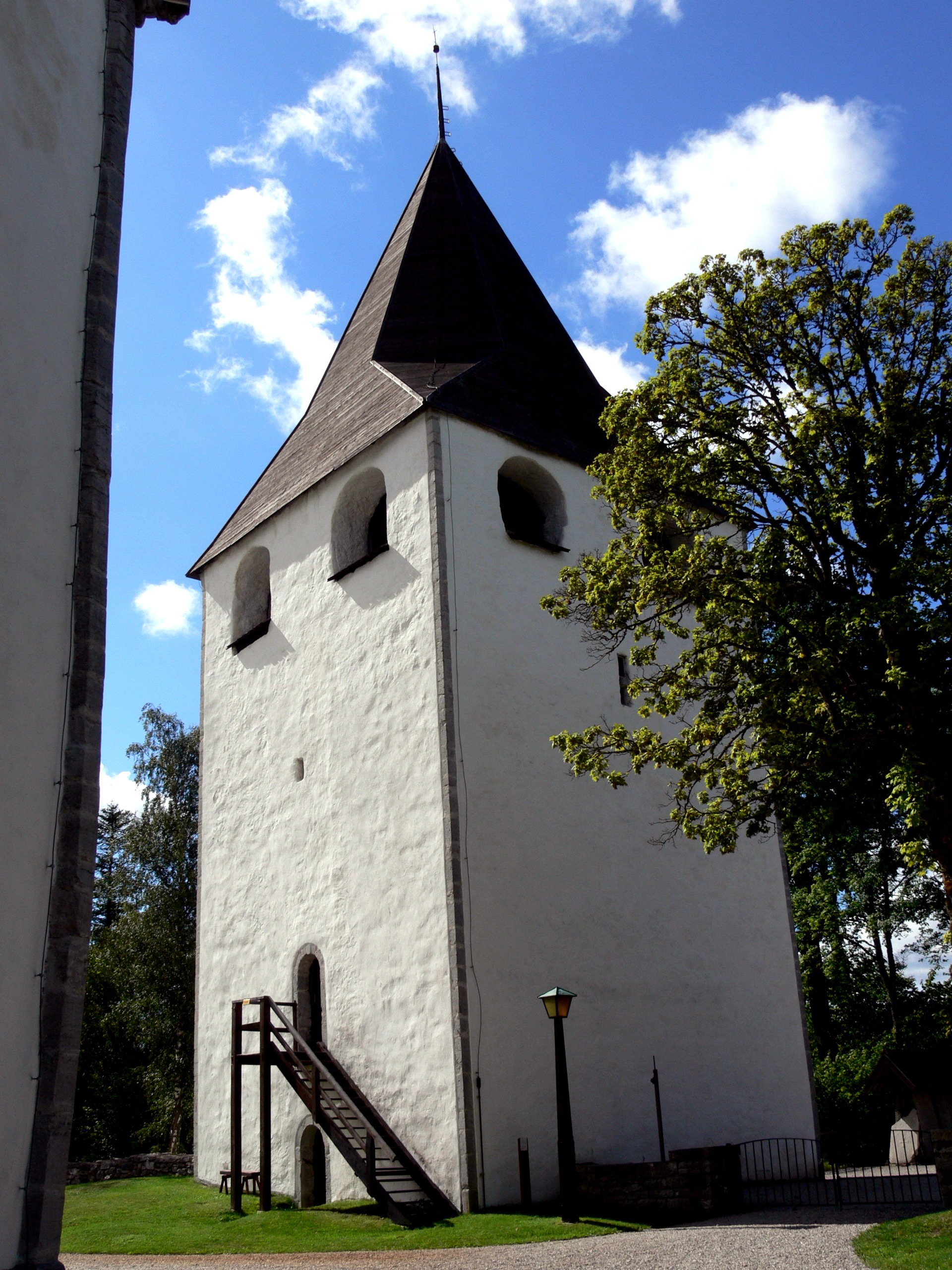 Lärbro kyrka auf Gotland. Kastal ( Wehrturm ) aus dem 12.Jhdt.